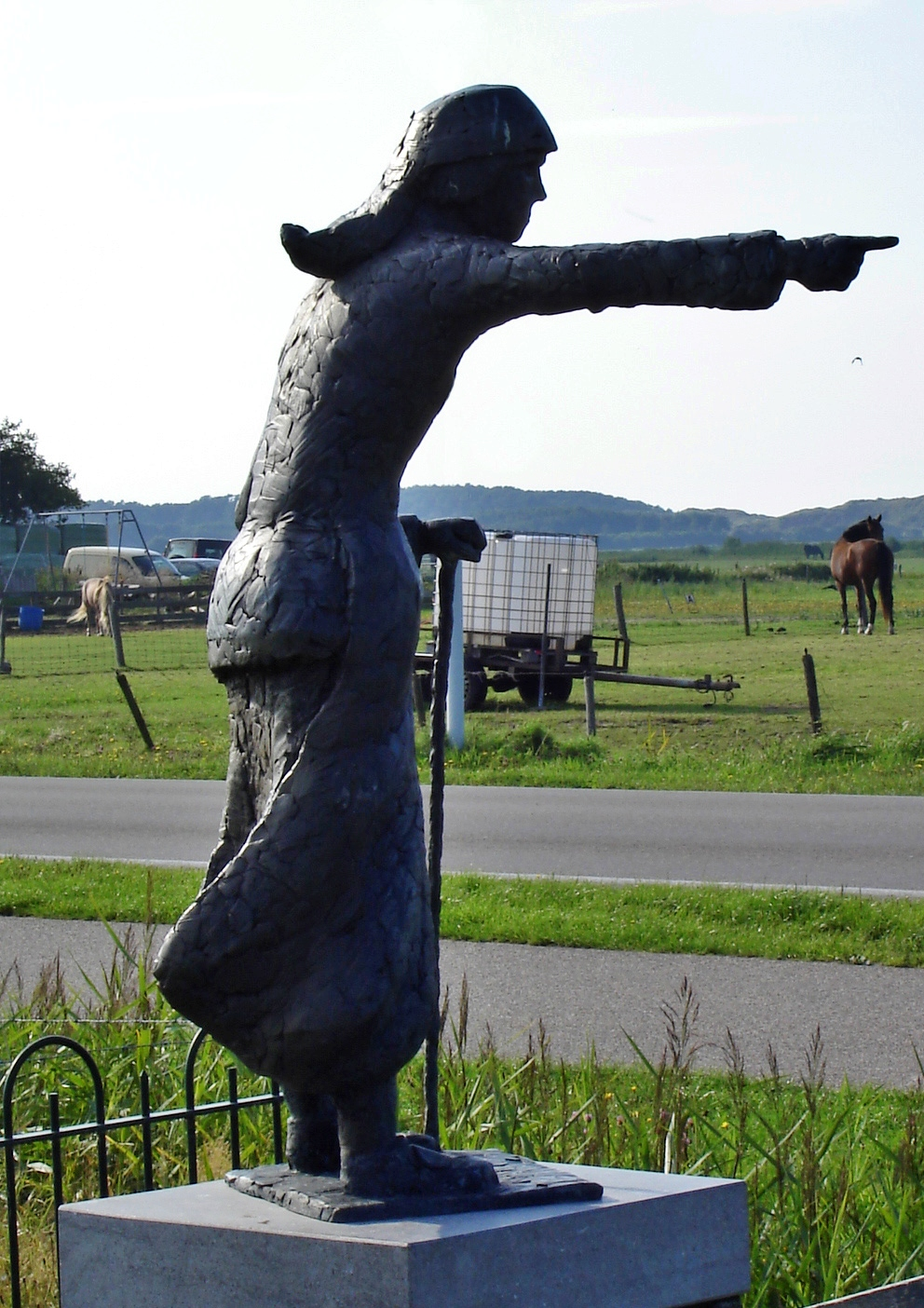 Terschelling, beeld van het Stryper wyfke, made by Huib Noorlander in 1982